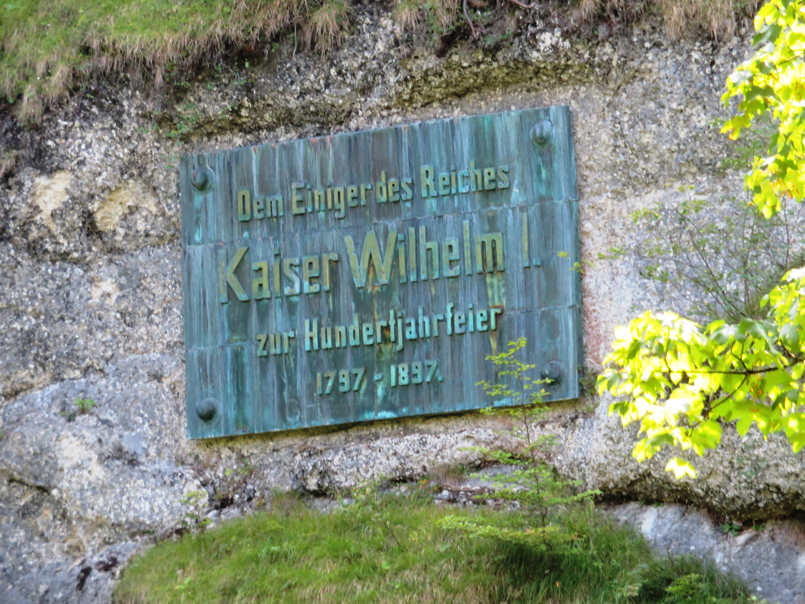 Kaiser-Wilhelm-Gedächtnistafel im Steigbachtobel